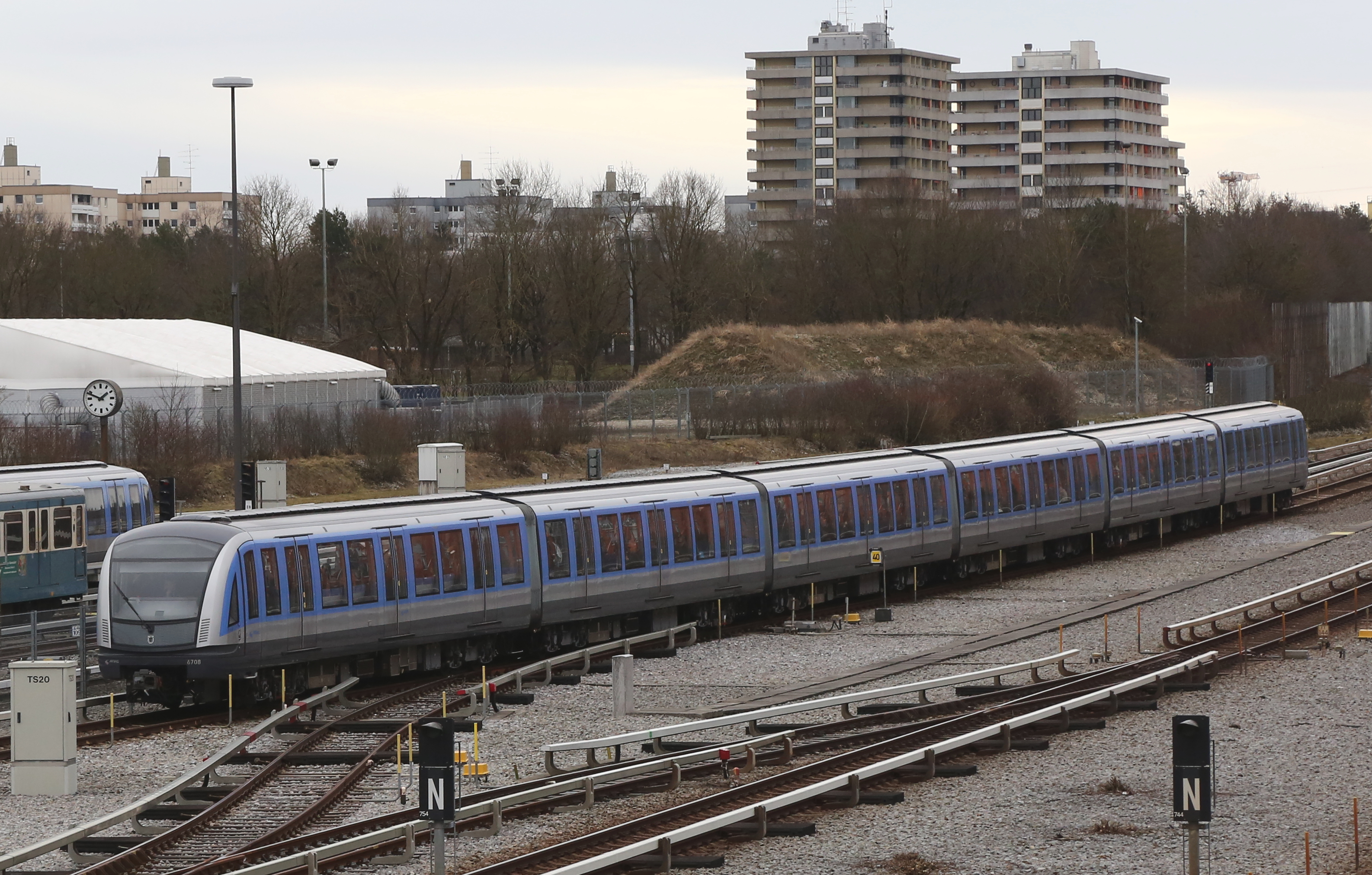 Ein Fahrzeug der Baureihe C2 der U-Bahn-Linie 6 (München) erreicht die Endhaltestelle Fröttmaning. Störende Vegetation wurde rausretuschiert (vgl. Originaldatei) und das Bild an der Stelle leicht verändert.